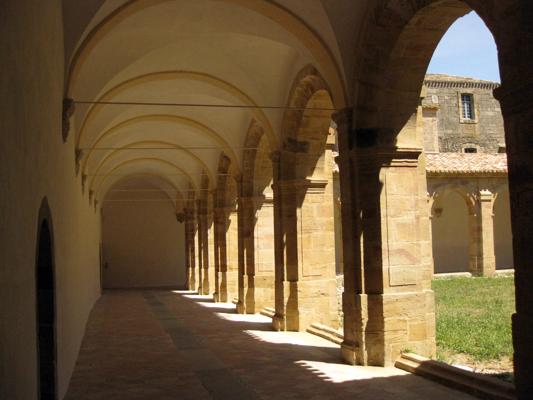 Antiga abadia Sainte-Marie d'Orbieu (La Grassa)